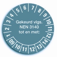 Keuringssticker